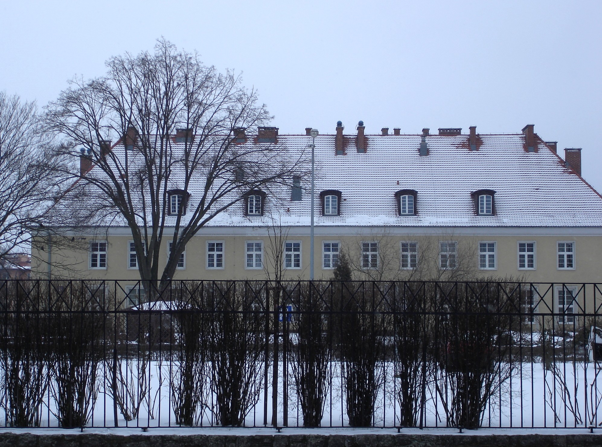 Koszary przy ul. Łukasińskiego Szczecin